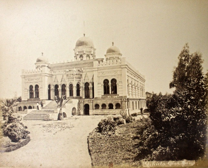 Una foto del palacio en 1883. Copyright